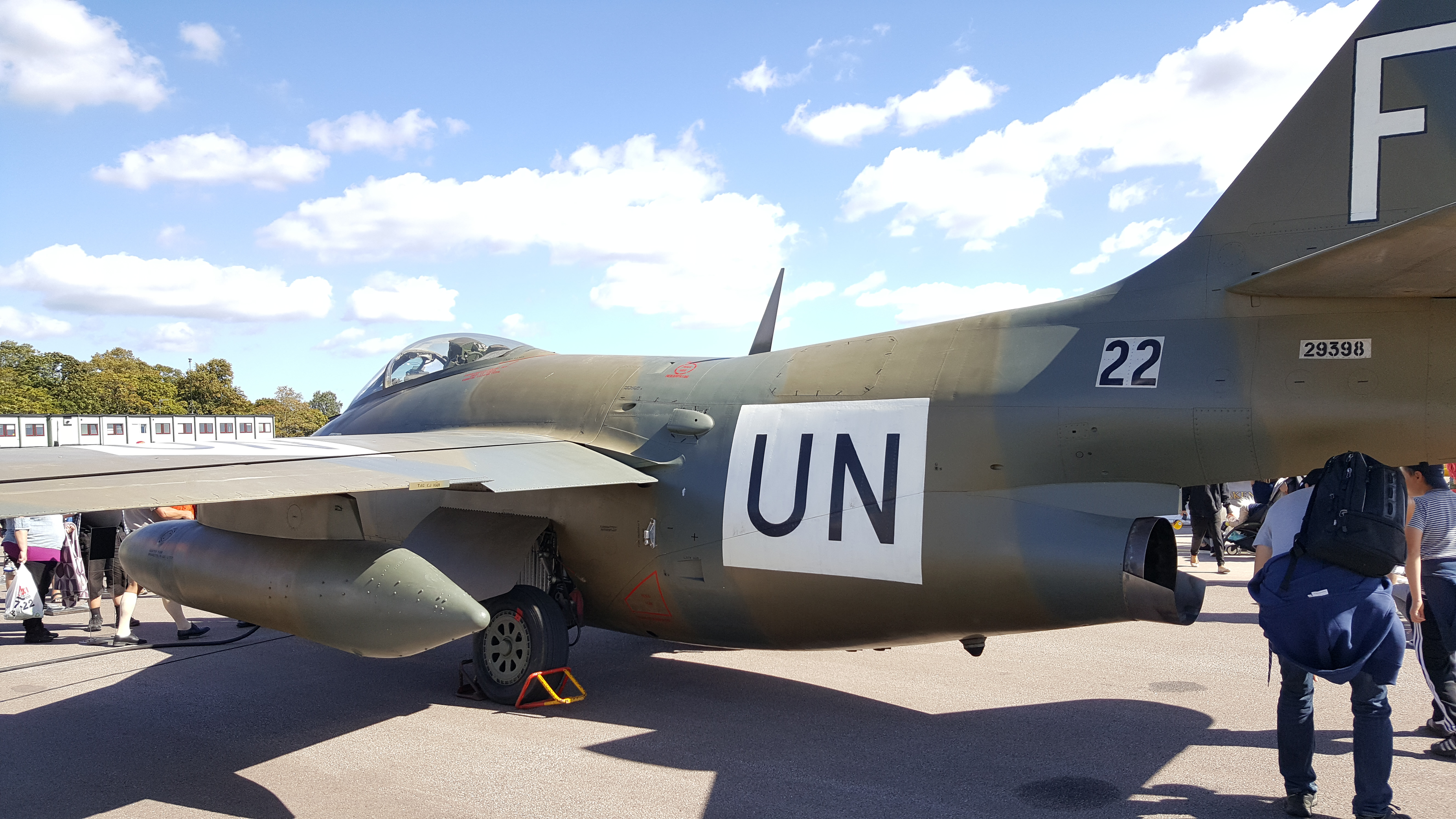 J29 Tunnan